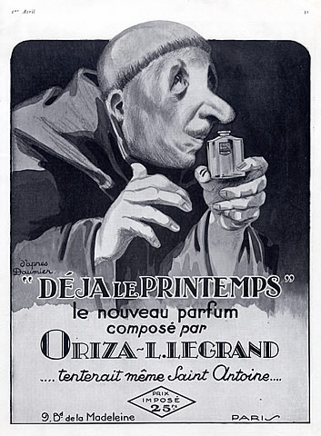 Publicité pour les parfums L. Legrand (années 1920).